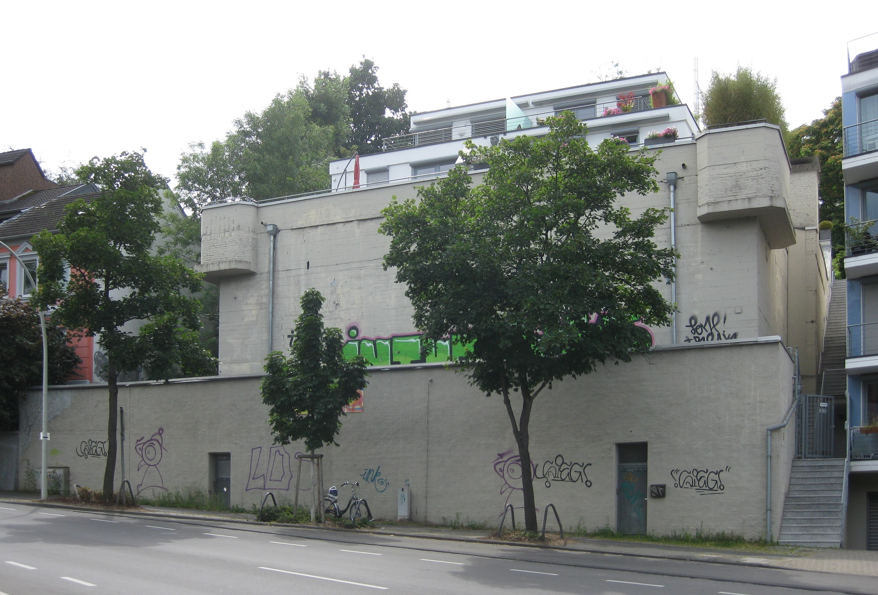 Bonn-Poppelsdorf: Trierer Straße 24: Hochbunker.